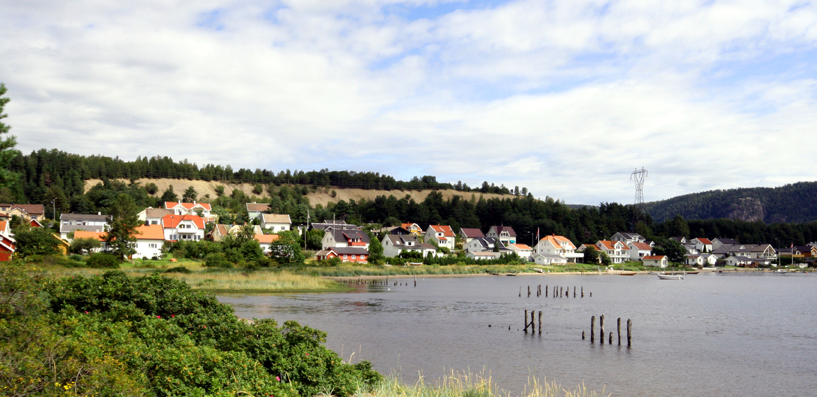 Verket, Hurum, Norway.